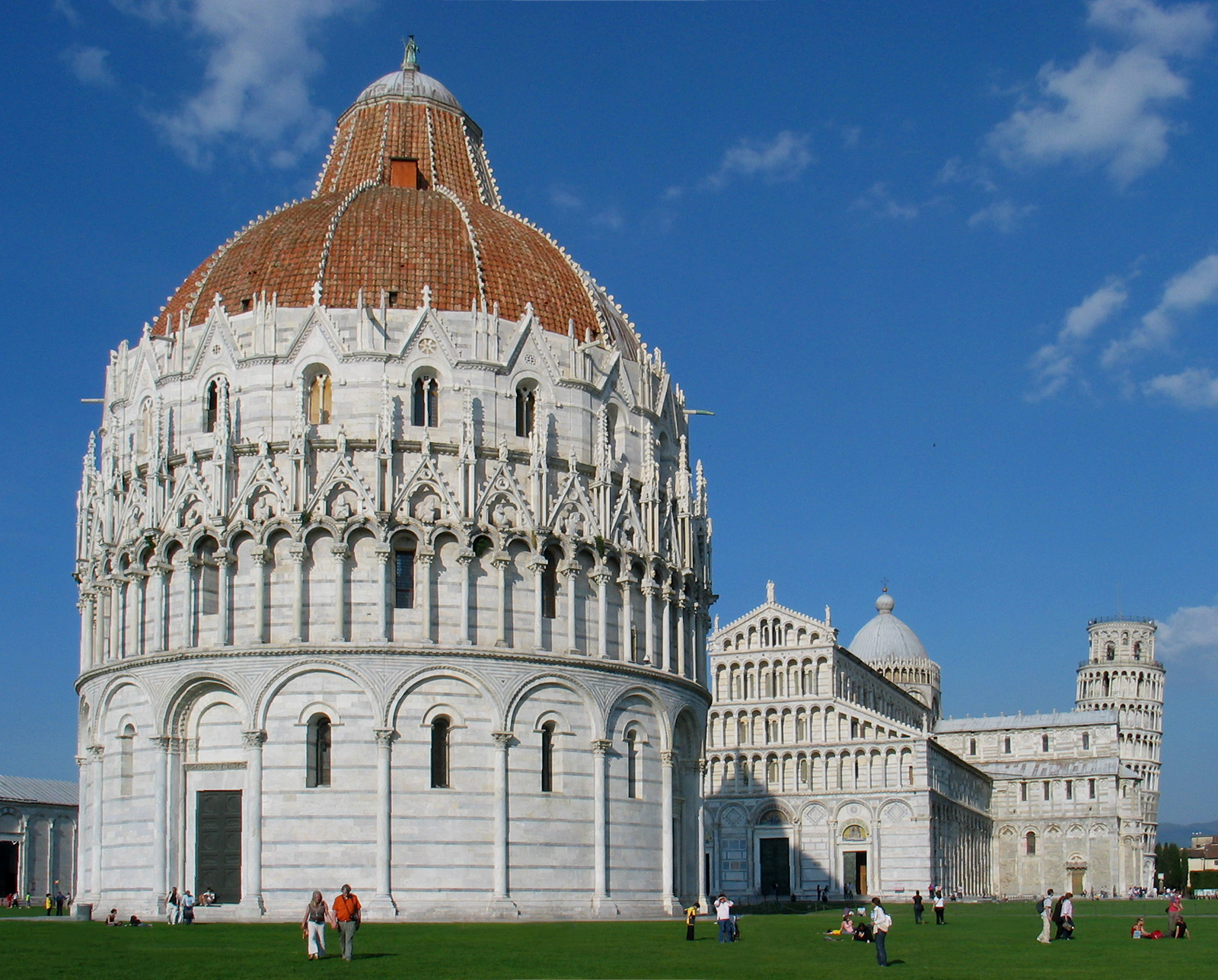 Piazza dei Miracoli, located in Pisa/Italy